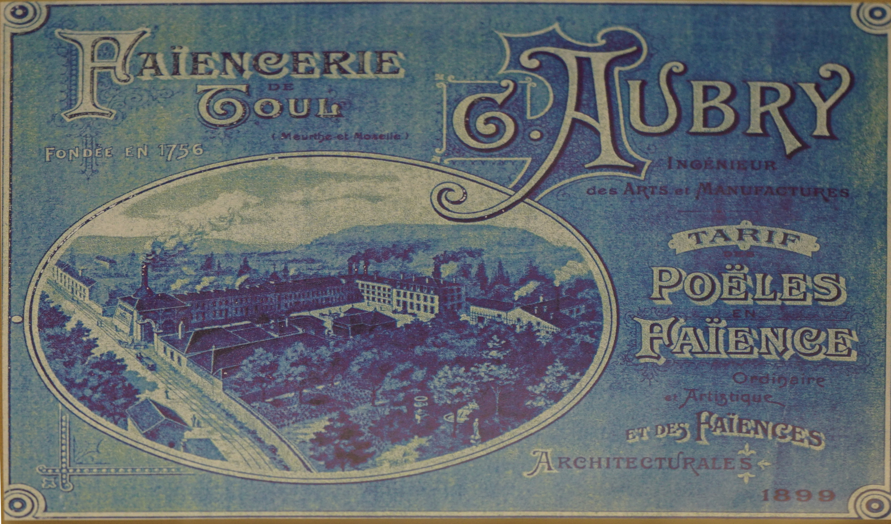 présenté au musée deToul.